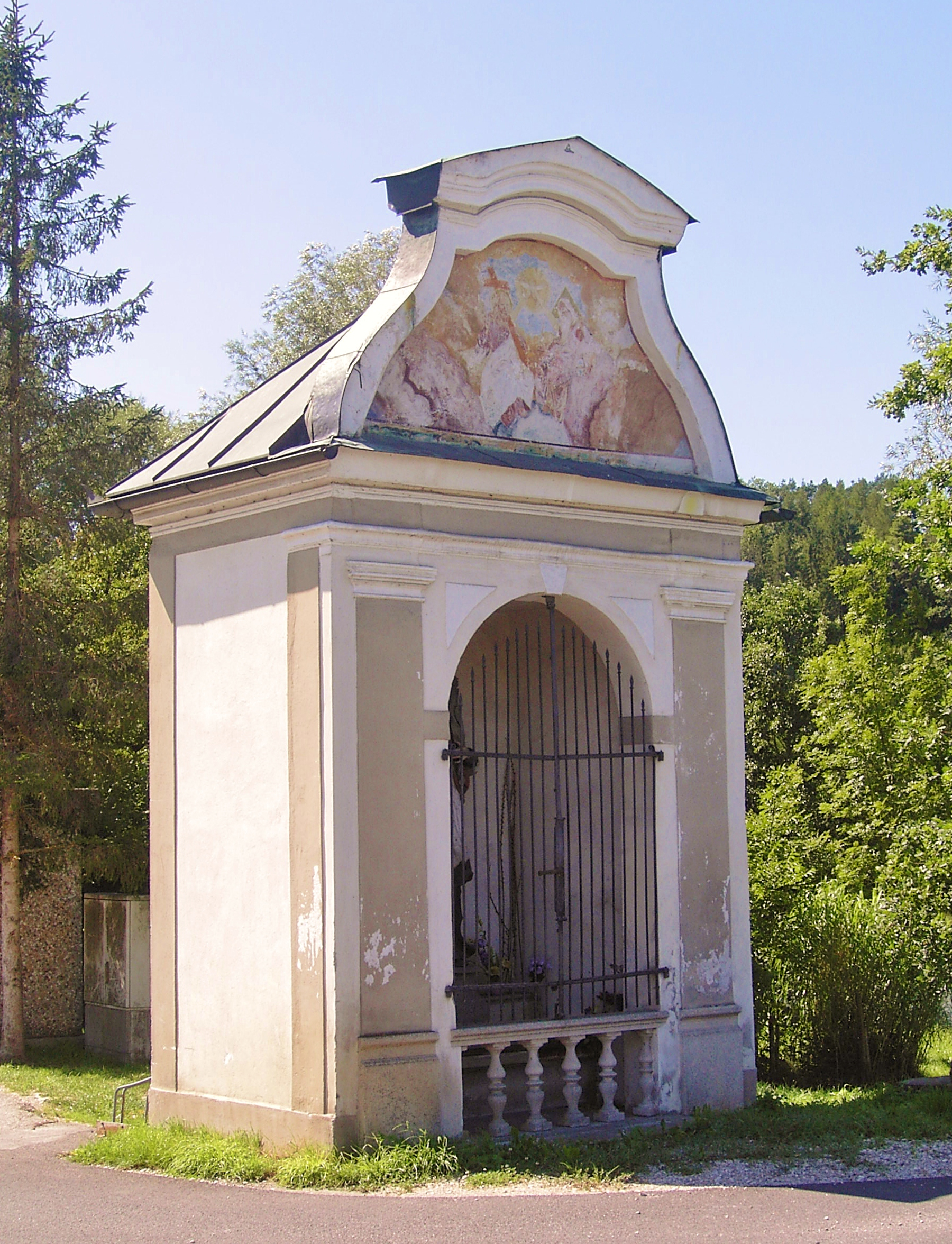 Aschach an der Steyr Wochenalt Kapelle Bahnhofstraße, Ansicht Fassade Bahnhofstraße